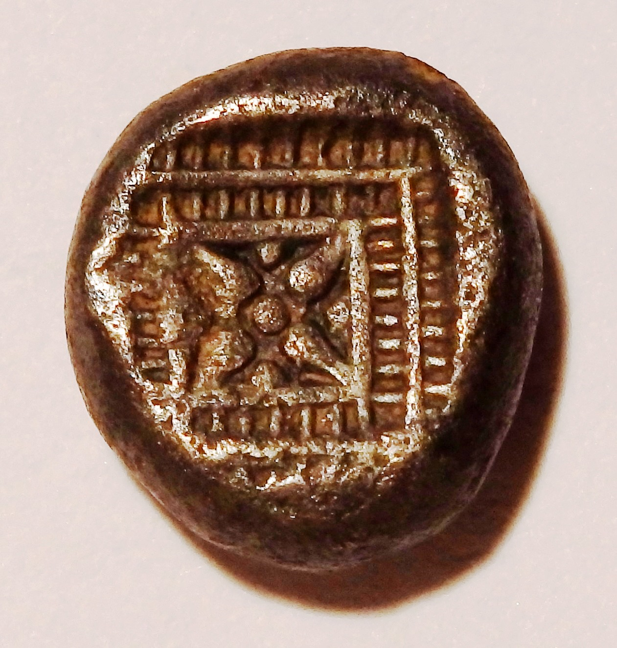 Rückseite des Diobols, verziertes Quadratum incusum